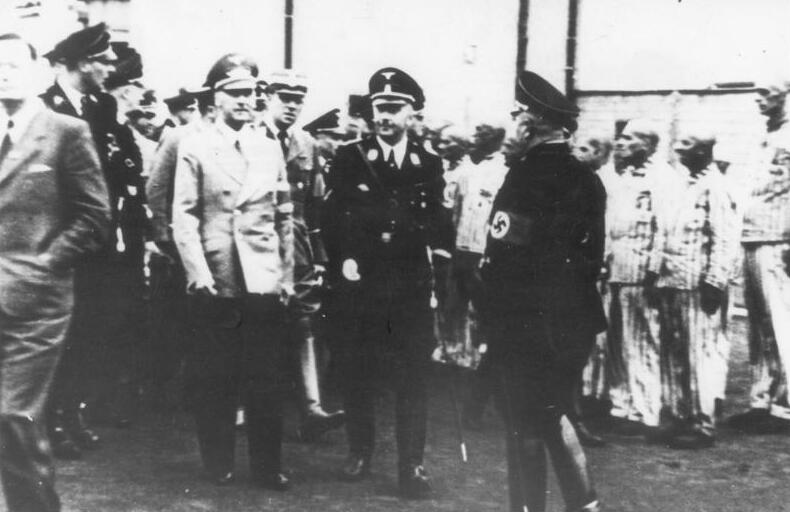 Zentralbild / TASS 3.4.69 Aus den Materialien der internationalen Konferenz über die Verfolgung von Nazi- und Kriegsverbrechen. - Dieses Bilddokument gehört zu den Materialien, die auf der Internationalen Konferenz über die Verfolgung von Nazi- und Kriegsverbrechen vorgelegt wurden. Die Konferenz fand vom 25.-28.3.1969 in Moskau statt. UBz: Hohe faschistische Führer besuchen das Konzentrationslager Sachsenhausen. (deutsche Aufnahme) - aus dem Album von Fotodokumenten über den Besuch von Offiziellen der Hitlerregierung im Konzentrationslager Sachsenhausen.